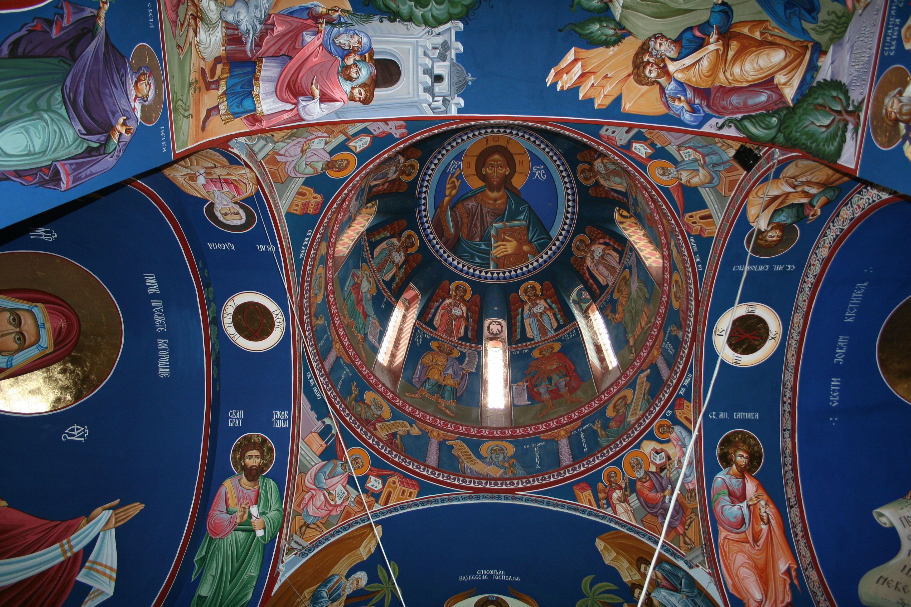 Crkva Svete Trojice u Zasavici II